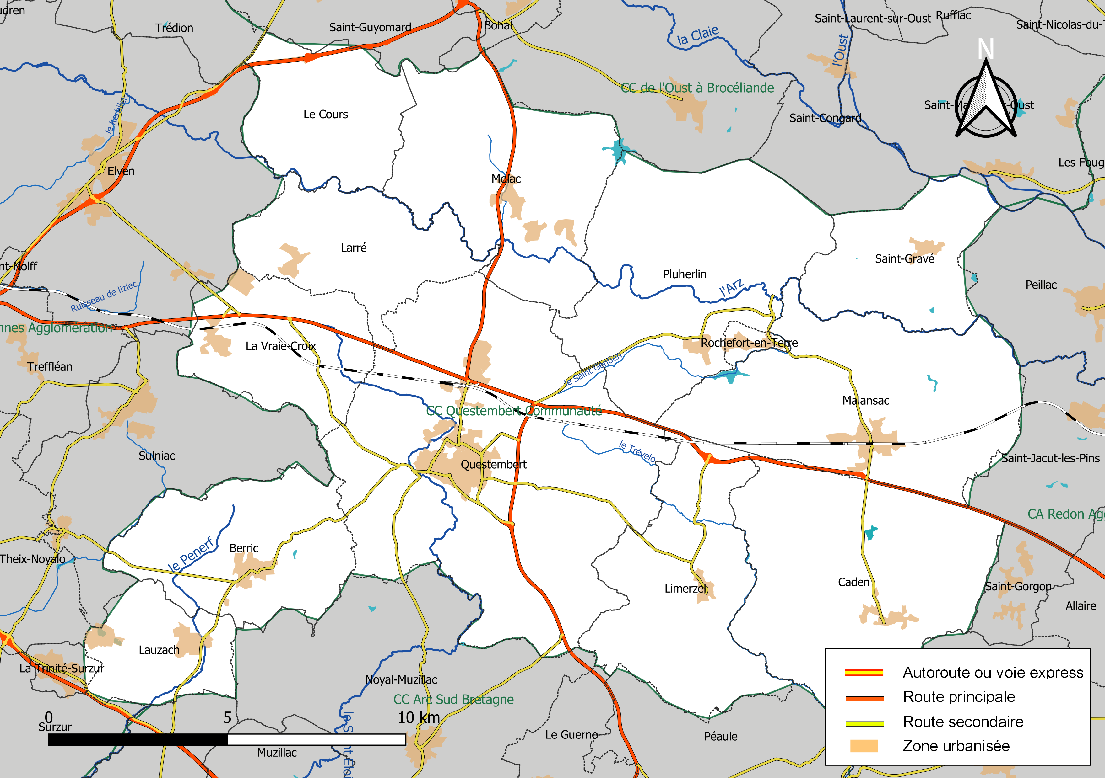 Carte géographique de l'intercommunalité Questembert Communauté, département du Morbihan, France. Composition au 1er janvier 2019.